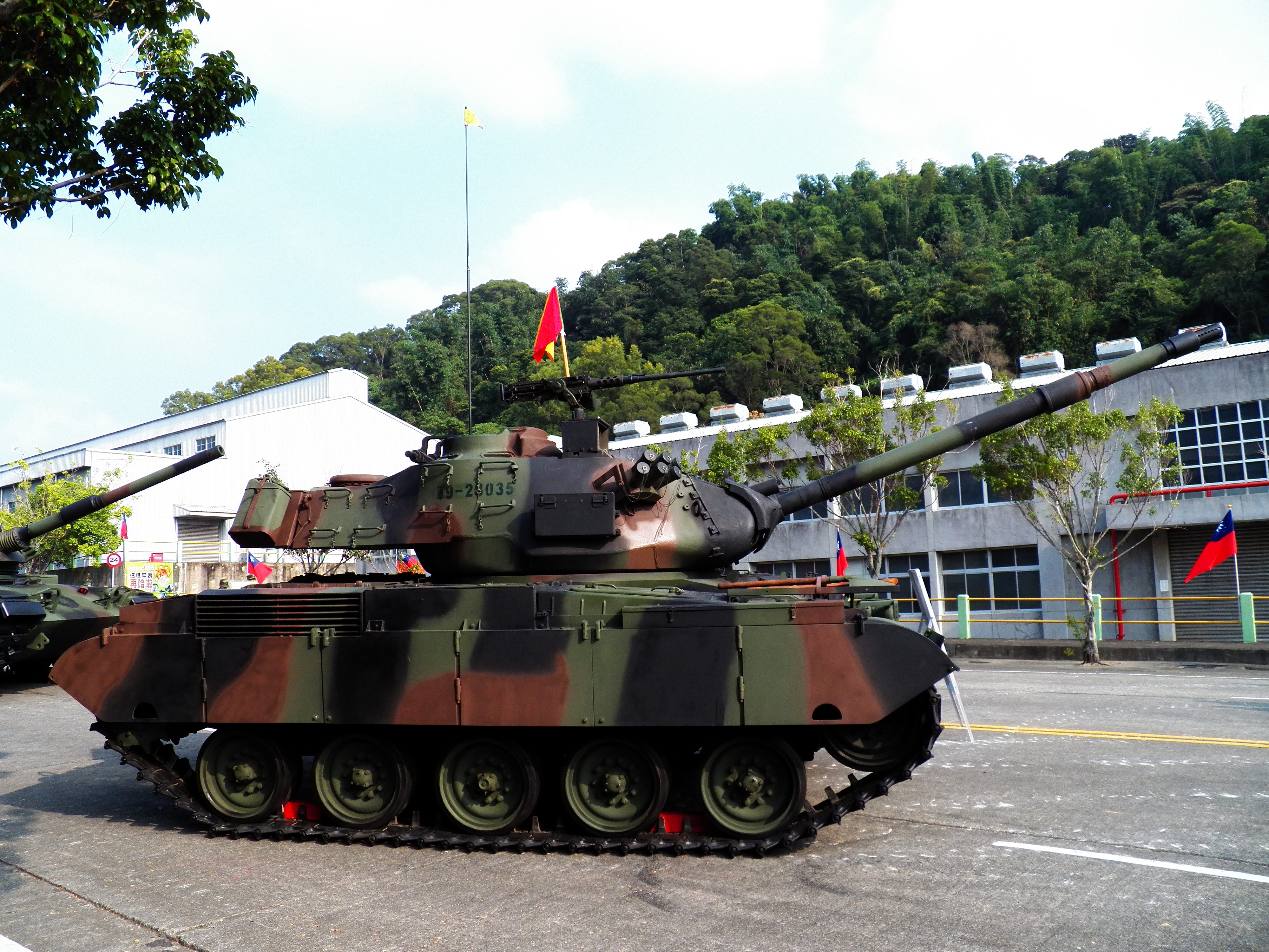 2012年兵整中心營區開放活動，岳崗路展示之M41D輕戰車右側。